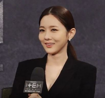 "시청률을 맞춰라!"…드라마 '아이템', 훈훈한 토크쇼 (디패짤)